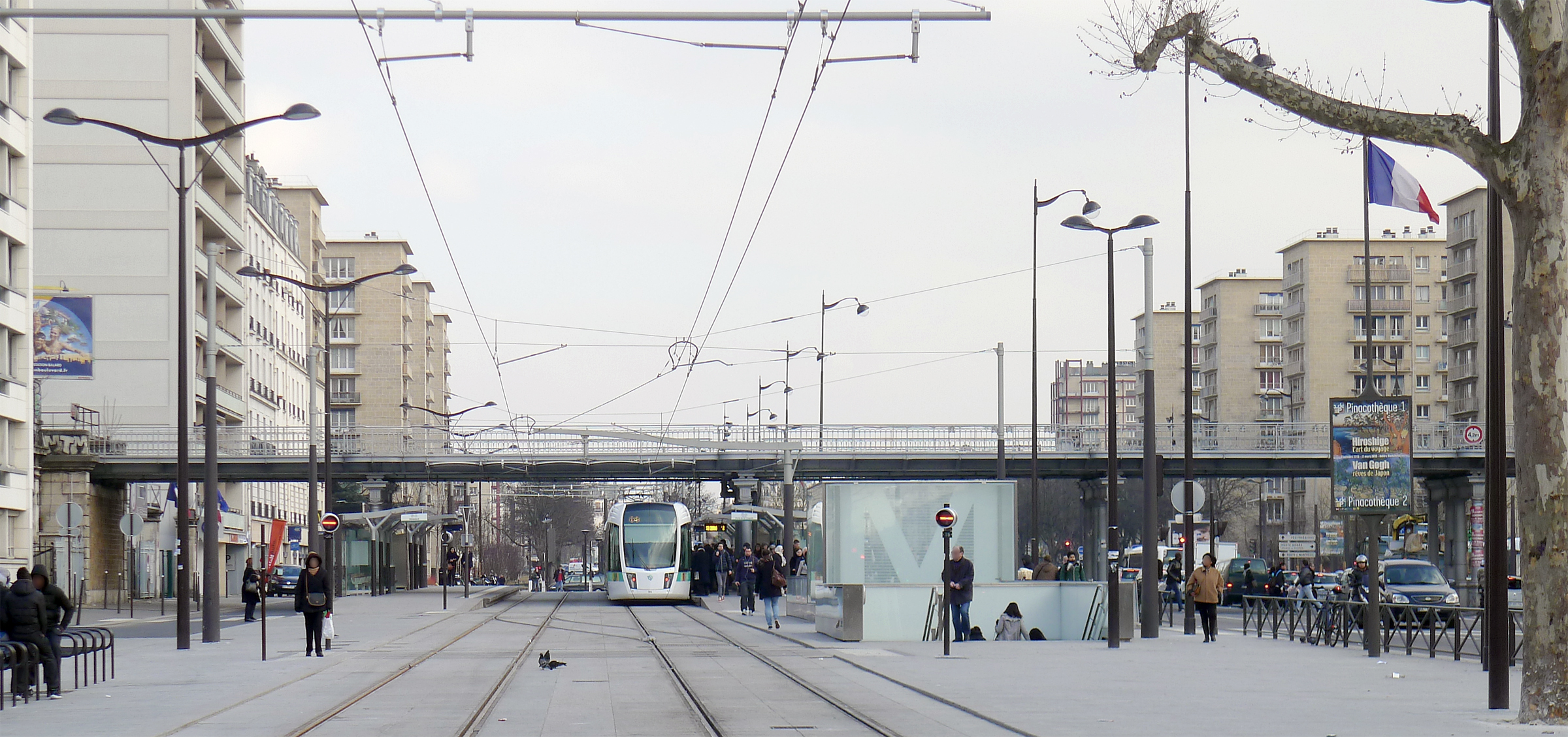 Ligne T3b et pont du cours de Vincennes - Paris XX